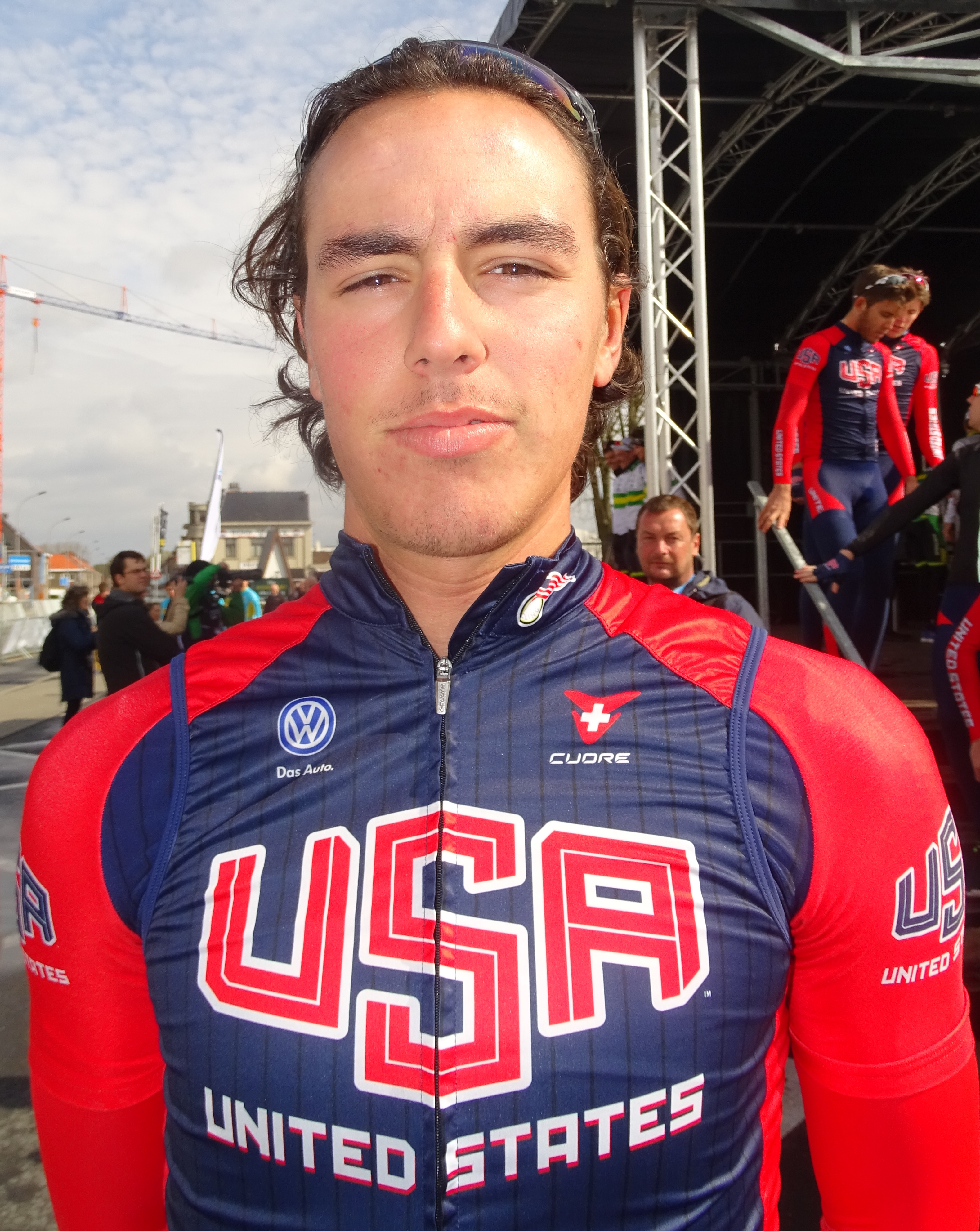 Reportage réalisé le samedi 11 avril à l'occasion du départ et de l'arrivée du Tour des Flandres espoirs 2015 à Audenarde, Belgique.